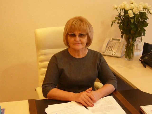 Портрет Падалко Людмили Іванівни на посаді головного лікаря Дніпропетровського обласного перинатального центру